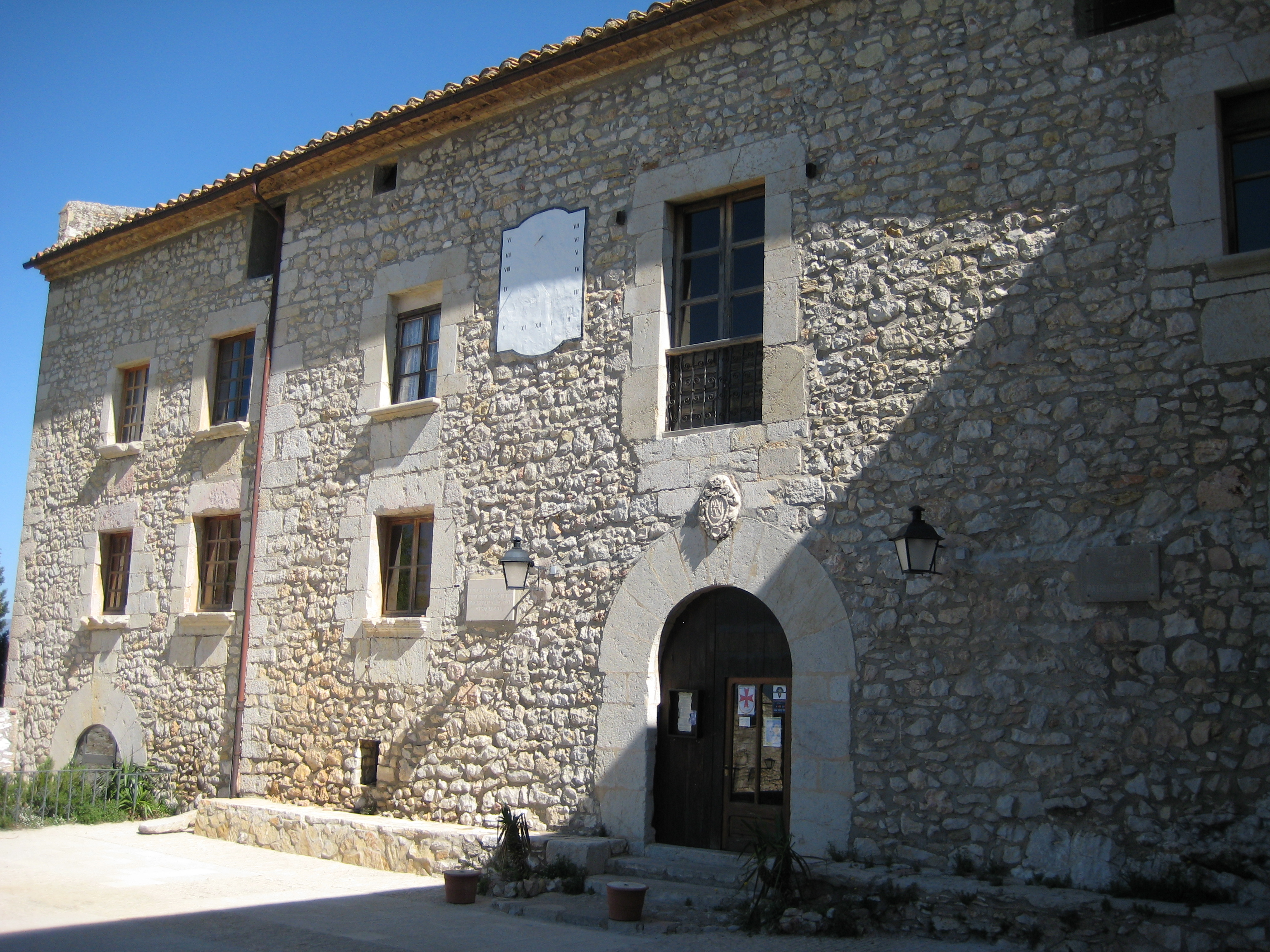 Hostatgeria de l'ermita de la Mare de Déu dels Àngels de Sant Mateu (Baix Maesrat)